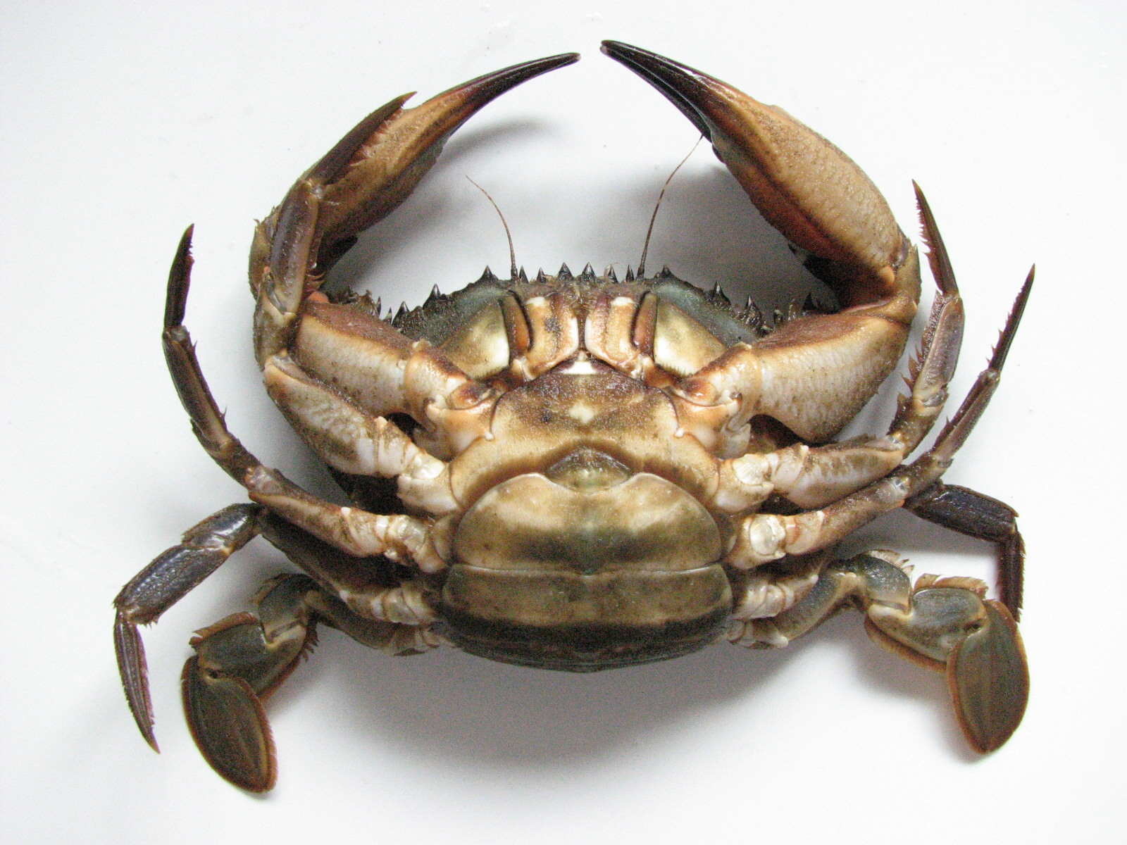 イシガニ(鹿島港・雌個体・腹面；Charybdis japonica)